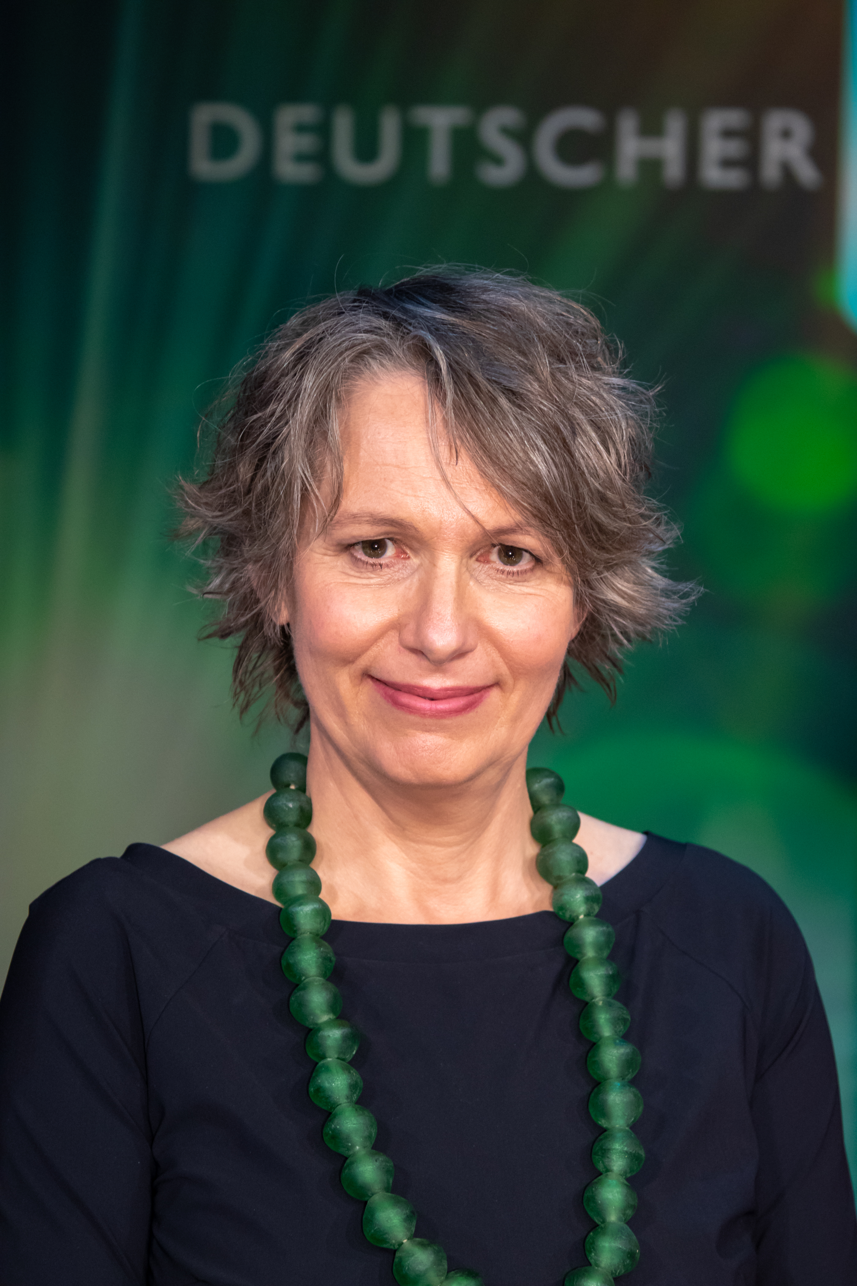 Deutscher Kamerapreis 2018 - Ehrenpreisträgerin Birgit Gudjonsdottir